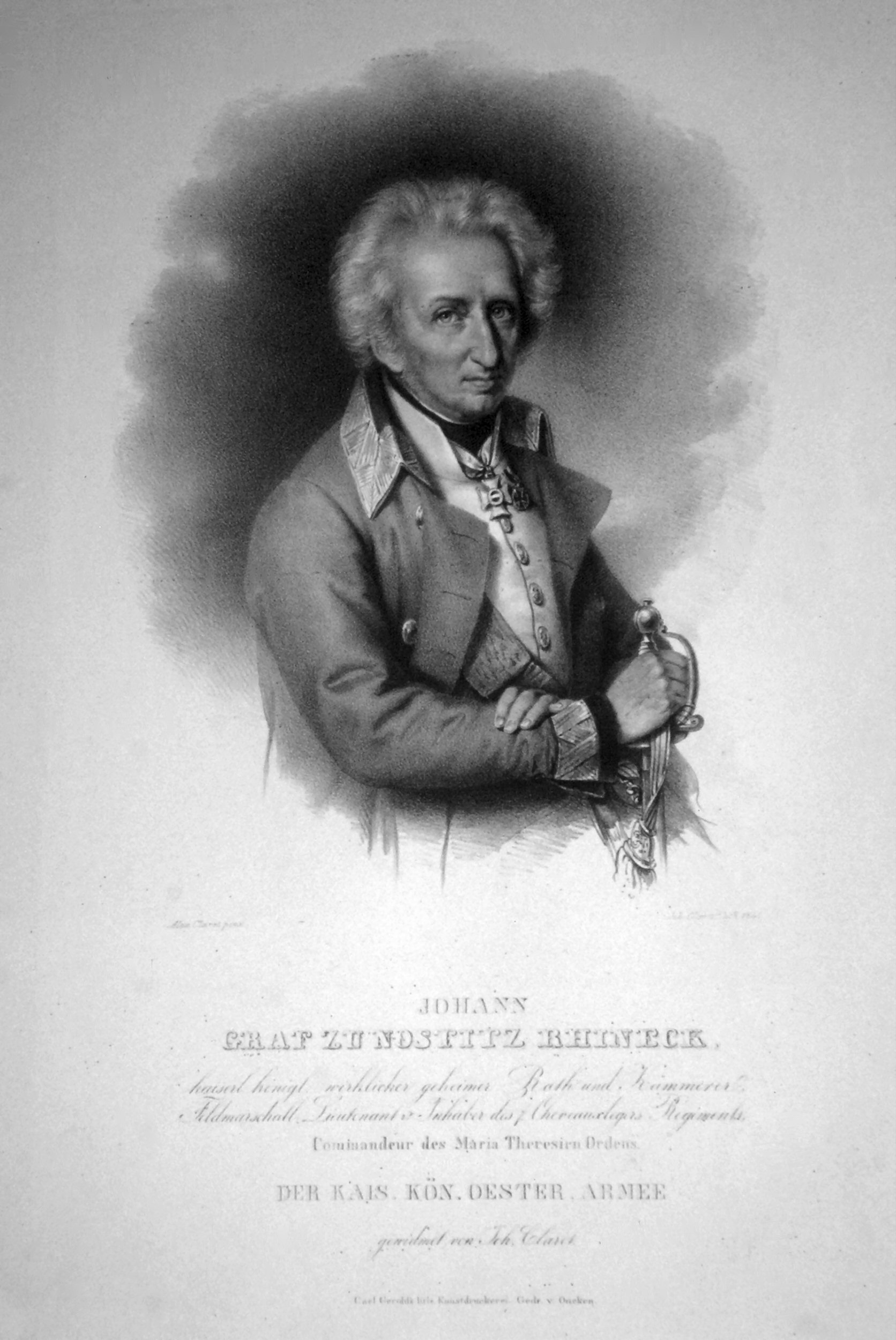 Johann Nepomuk Graf von Nostitz-Rieneck (1768-1840), Geheimrat, K. k. Kämmerer, k. k. Feldmarschallleutnant, Komandeur des Maria-Theresien-Ordens. Lithographie von Johann Baptist Clarot, 1841